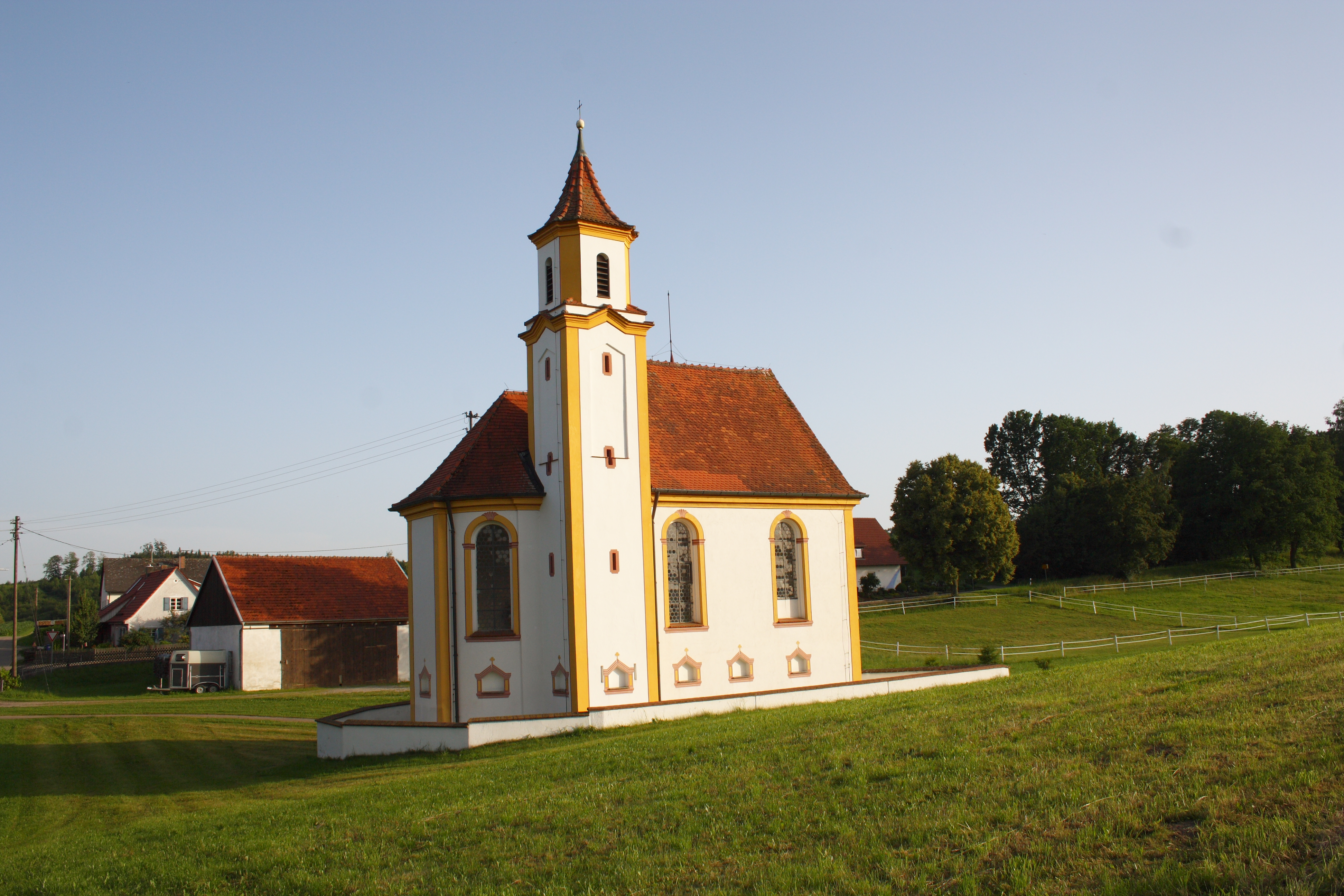 katholische Kapelle St. Maria Magdalena in Eichenhofen, einem Ortsteil von Haldenwang im Landkreis Günzburg (Bayern)